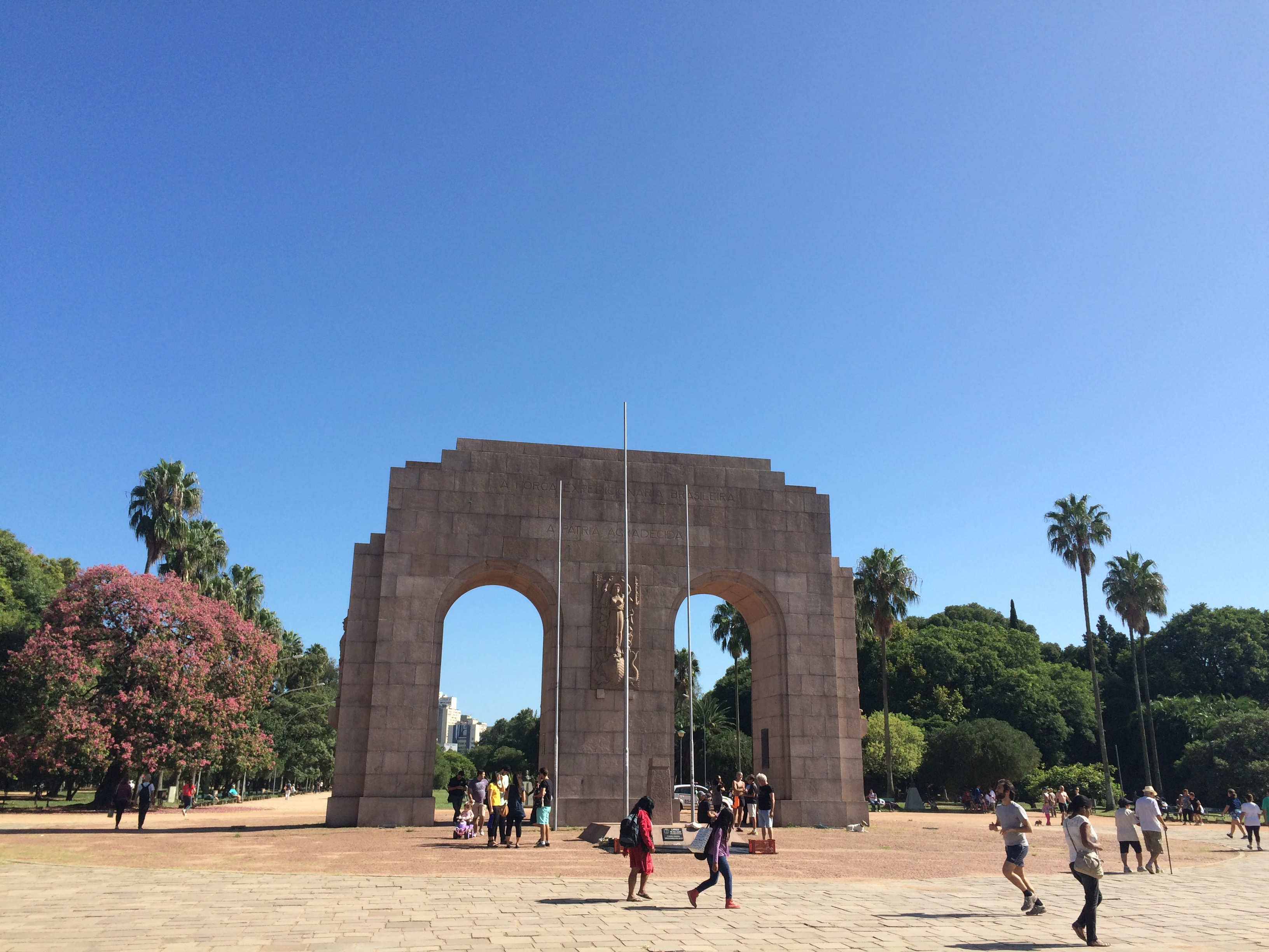 Parque Farroupilha - Porto Alegre, RS